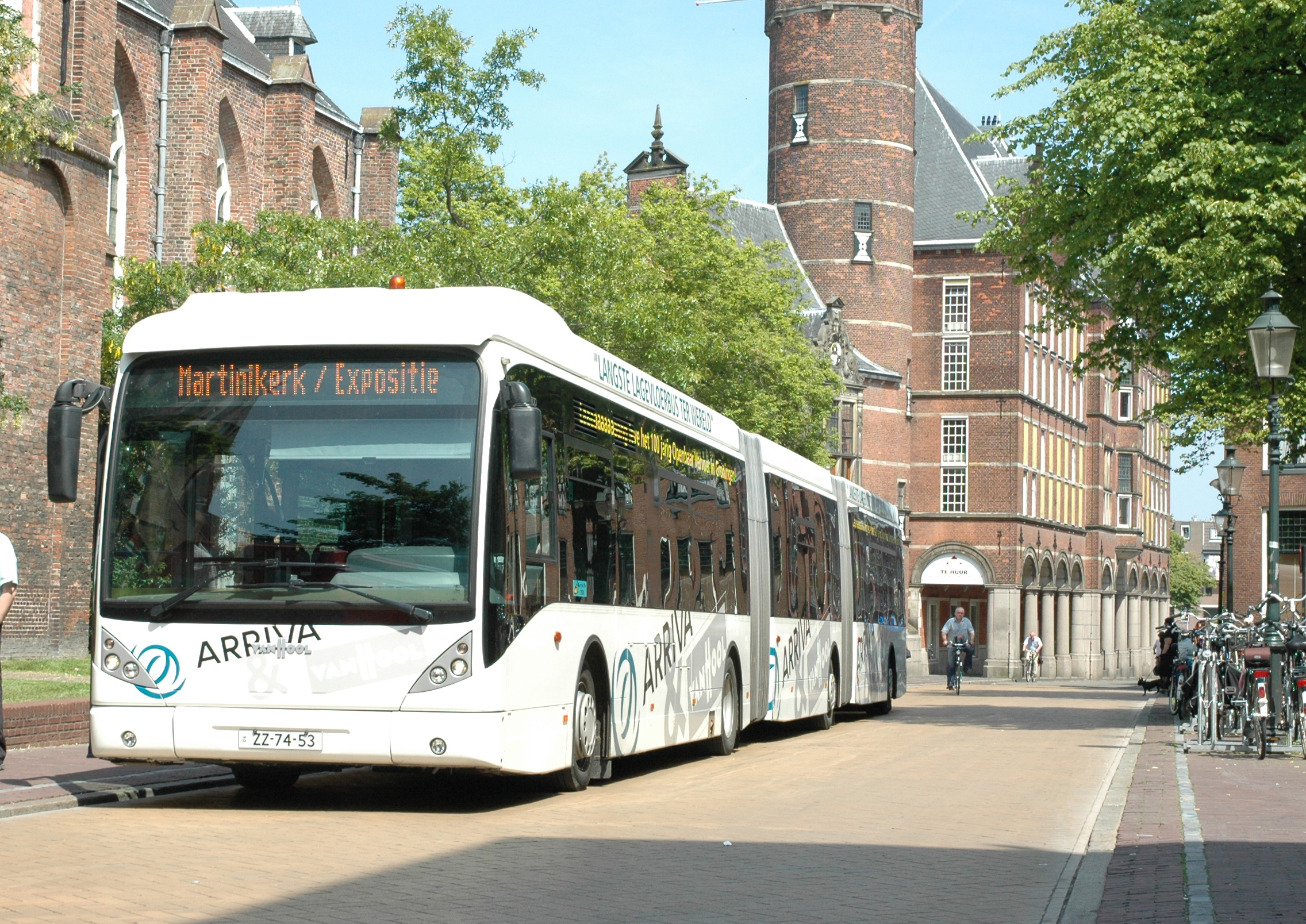 Van Hool bus van het type AGG300 tijdelijk bij Arriva te Groningen. De bus was gehuurd ter gelegenheid van 100 jaar Gemeentram Groningen (GTG).